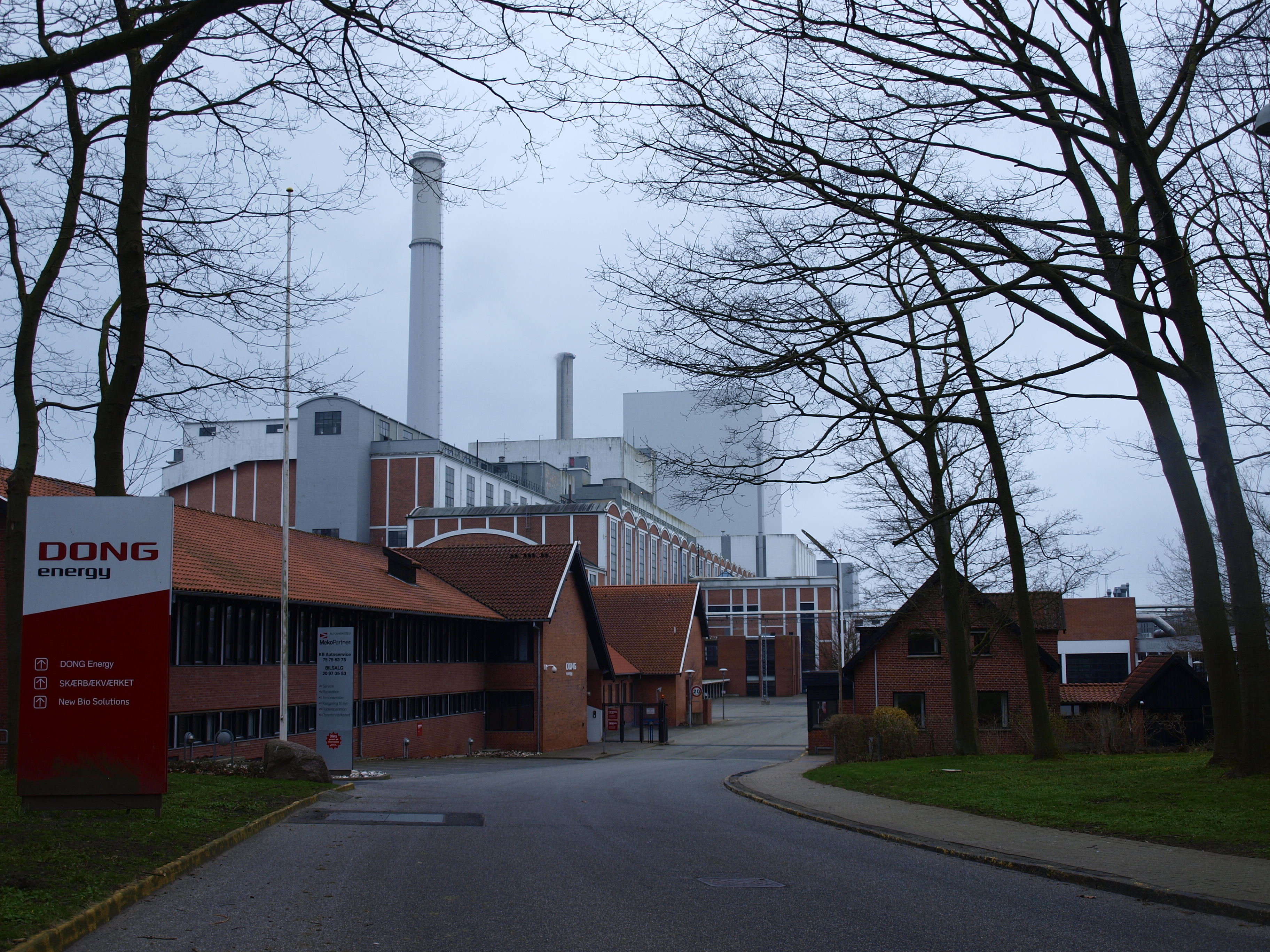 Skærbækværkets indgang, 15. april 2015